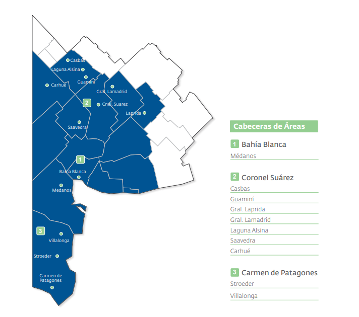 Mapa del área de concesión de la empresa energética EDES, en la provincia de Buenos Aires.